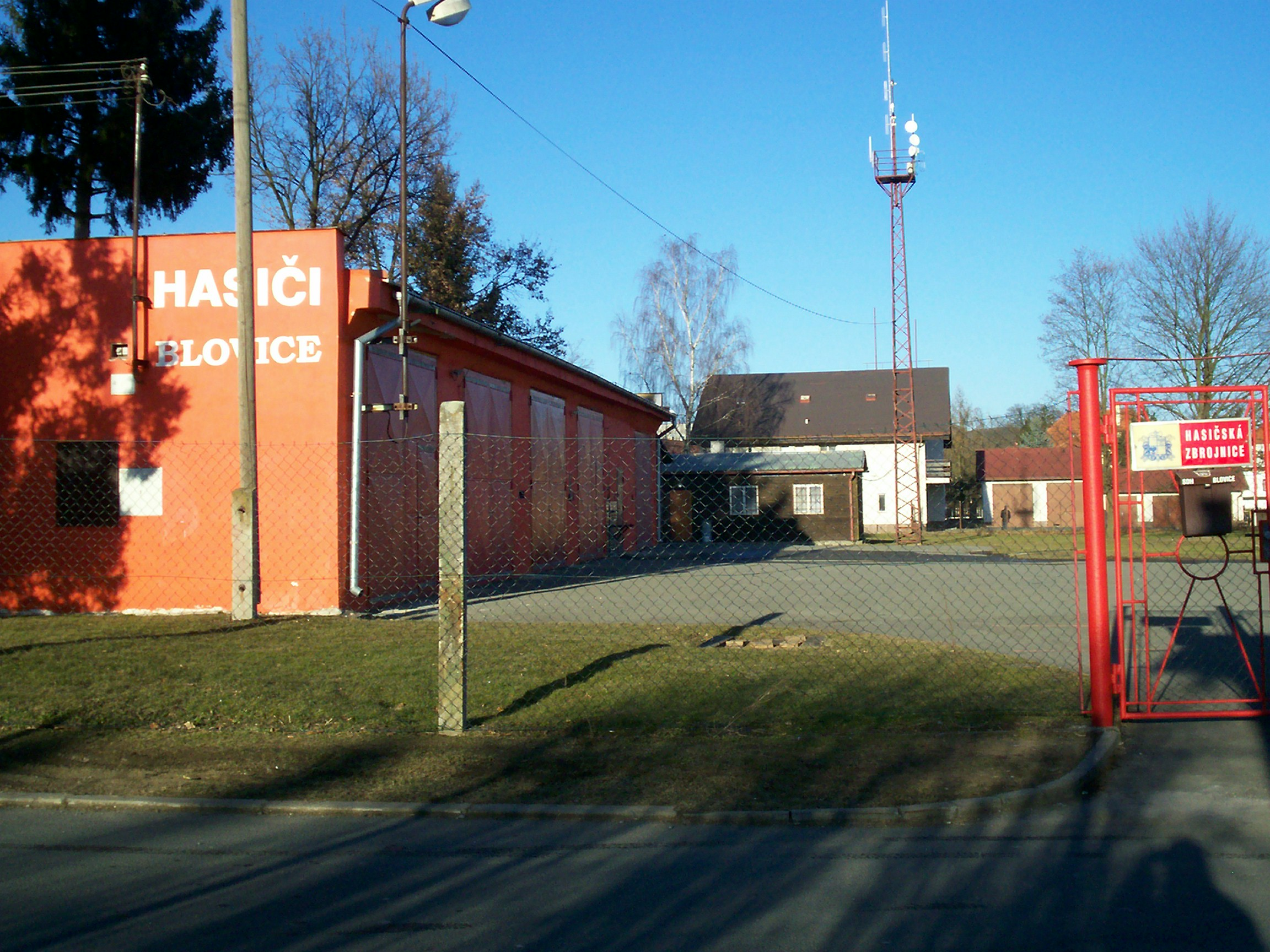 Hasičská zbrojnice v Blovicích (před rekonstrukcí), 2011